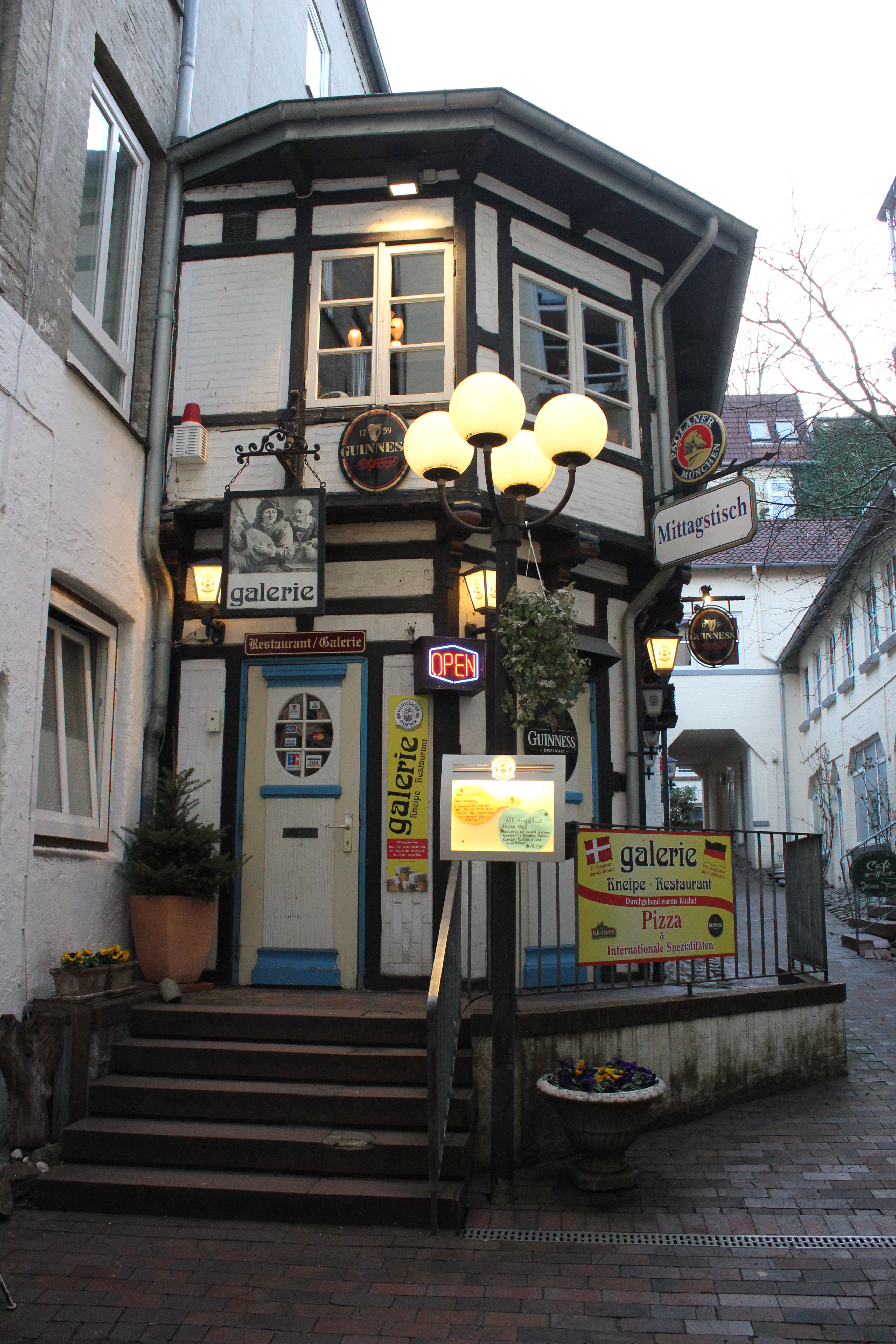 Galerie (Flensburg), Eingang, Bild 01